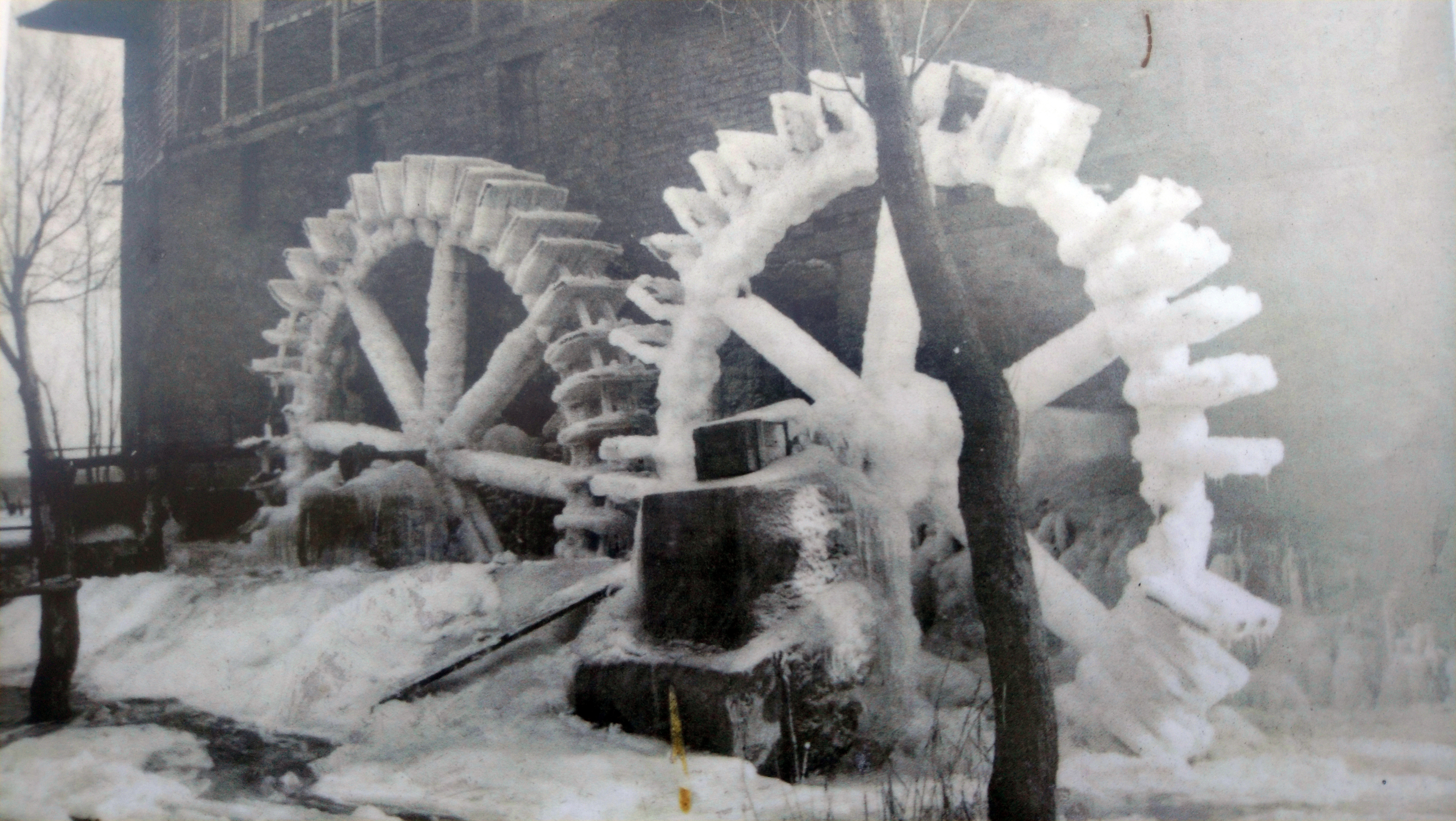 Die vereisten Wasserräder der Oberen Fallermühle in Kahl am Main